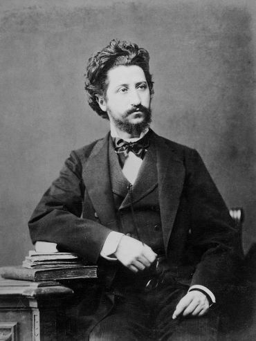 Goldziher Ignác (1850–1921) nyelvész, orientalista portréja